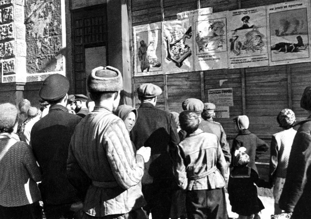 Жители освобождённого города Сталино (Донецка) читают "Окна ТАСС"